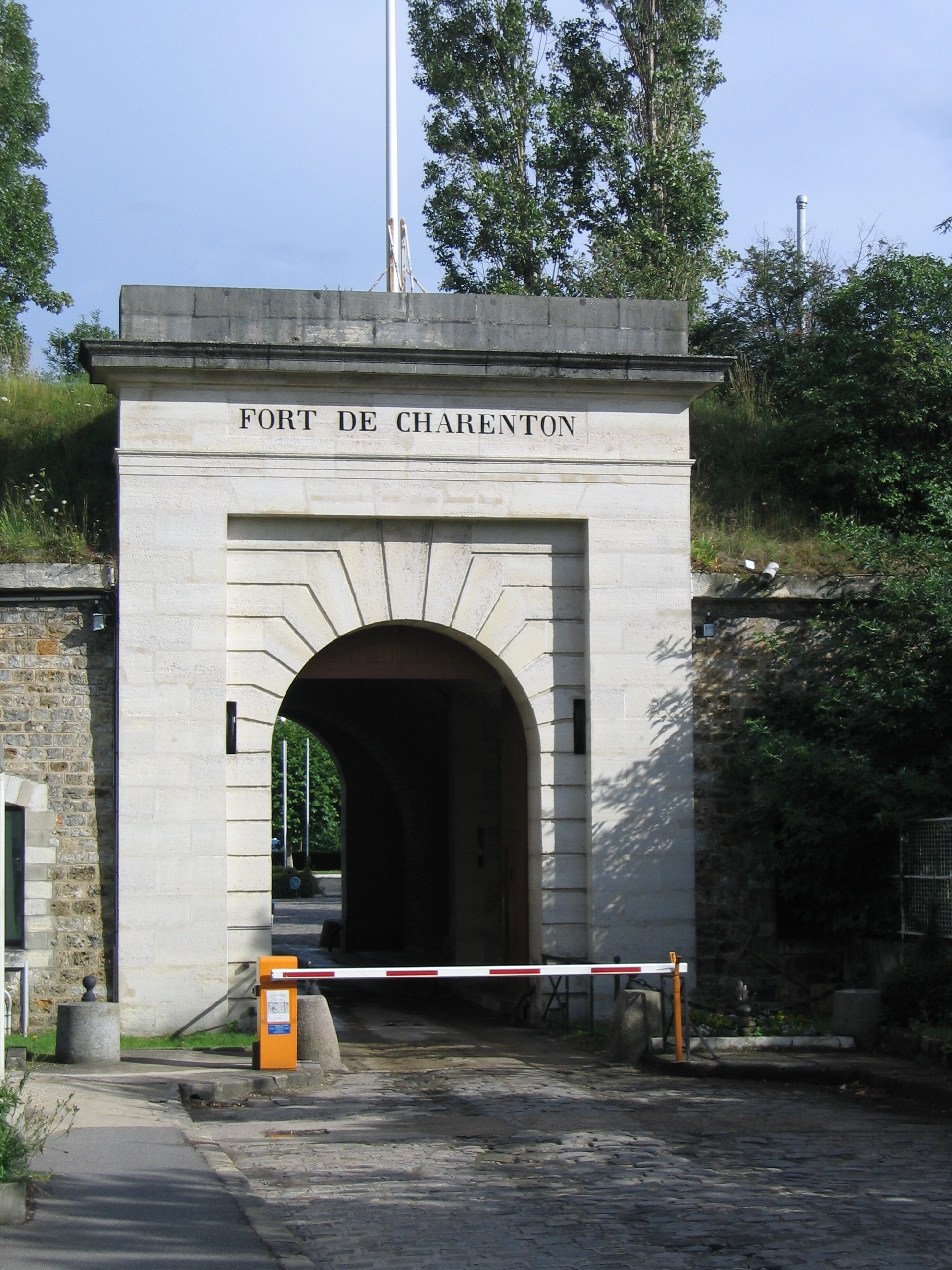 Entrée du fort de Charenton à Maisons-Alfort France